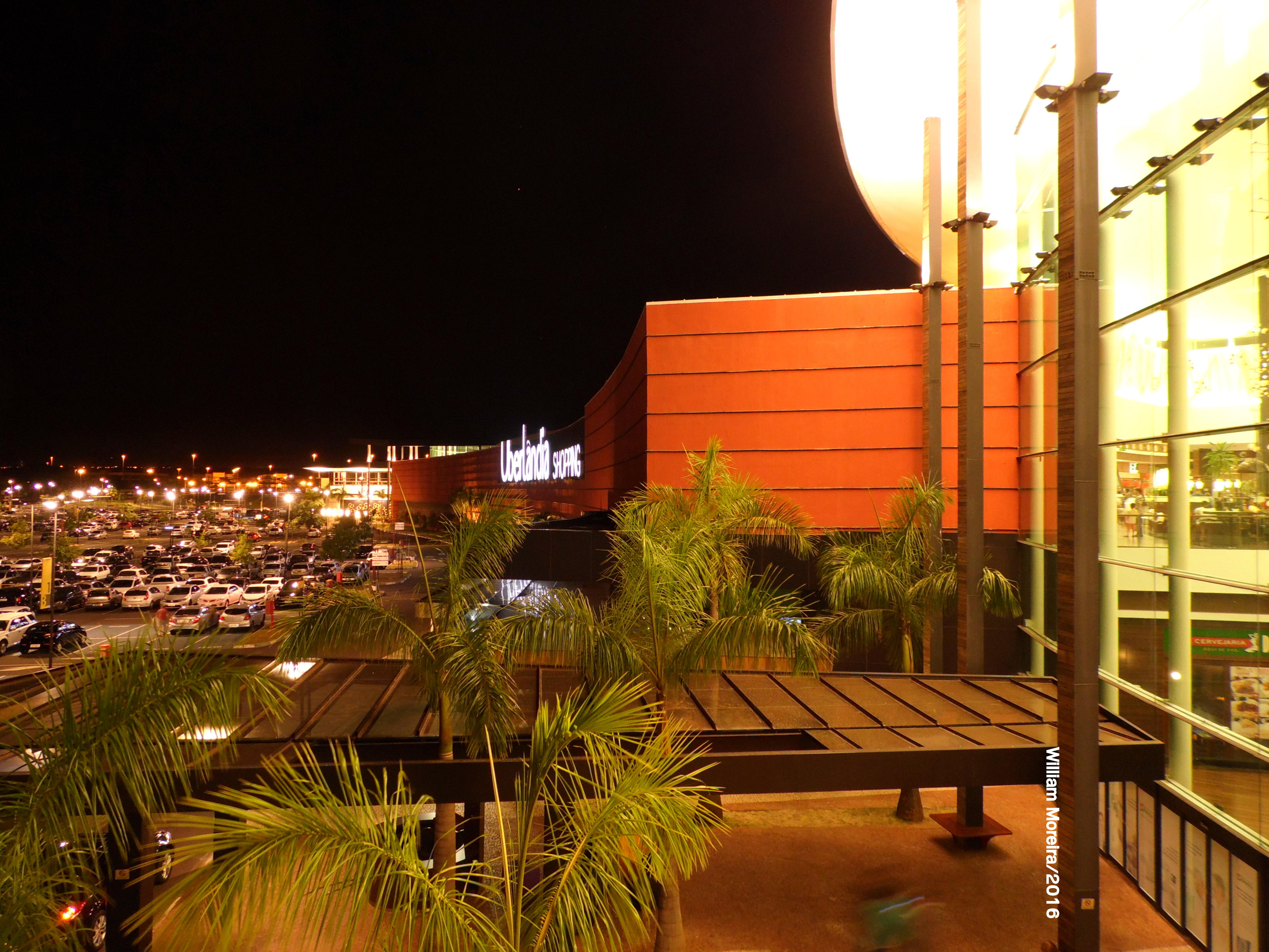 Uberlândia Shopping, um dos principais do Triângulo Mineiro e o segundo maior da cidade de Uberlândia.